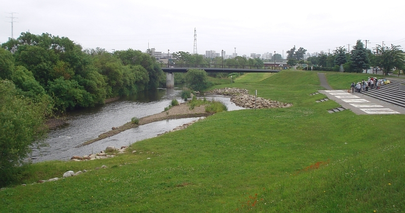 北海道・札幌市南区・清田区・厚別区・白石区・江別市を流れる厚別川。親水公園。